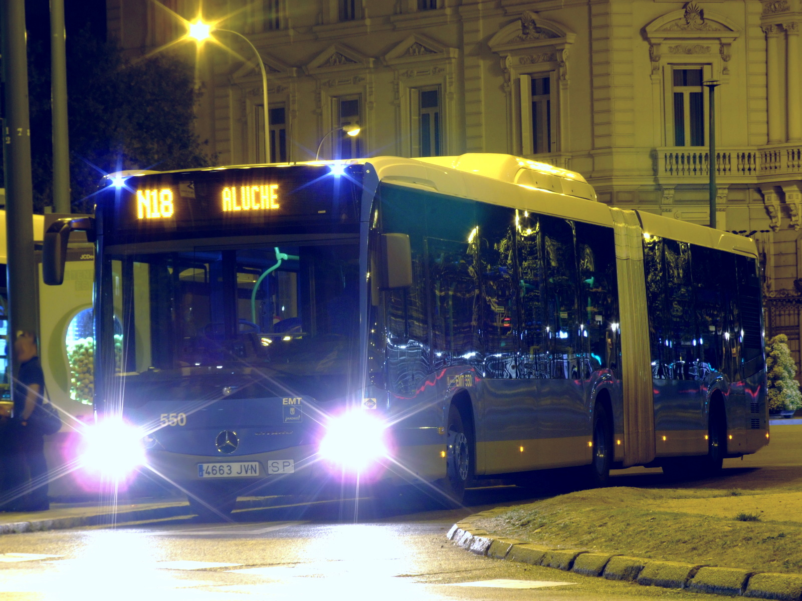 Autobús articulado de gas natural Mercedes-Benz Citaro G de la Empresa Municipal de Transportes de Madrid.